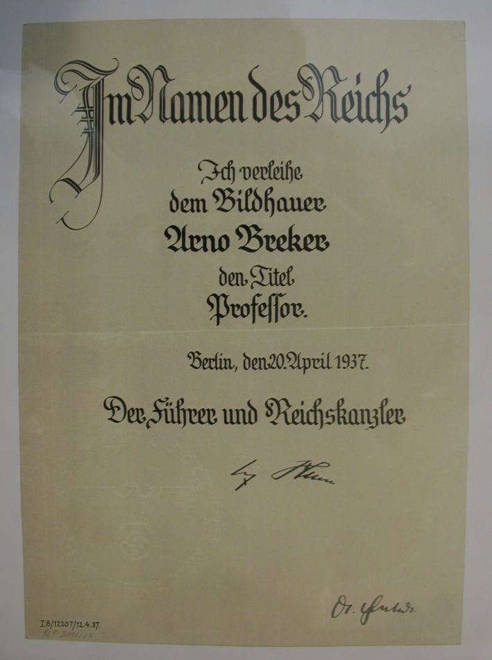 Urkunde der Ernennung Arno Brekers zum Professor.